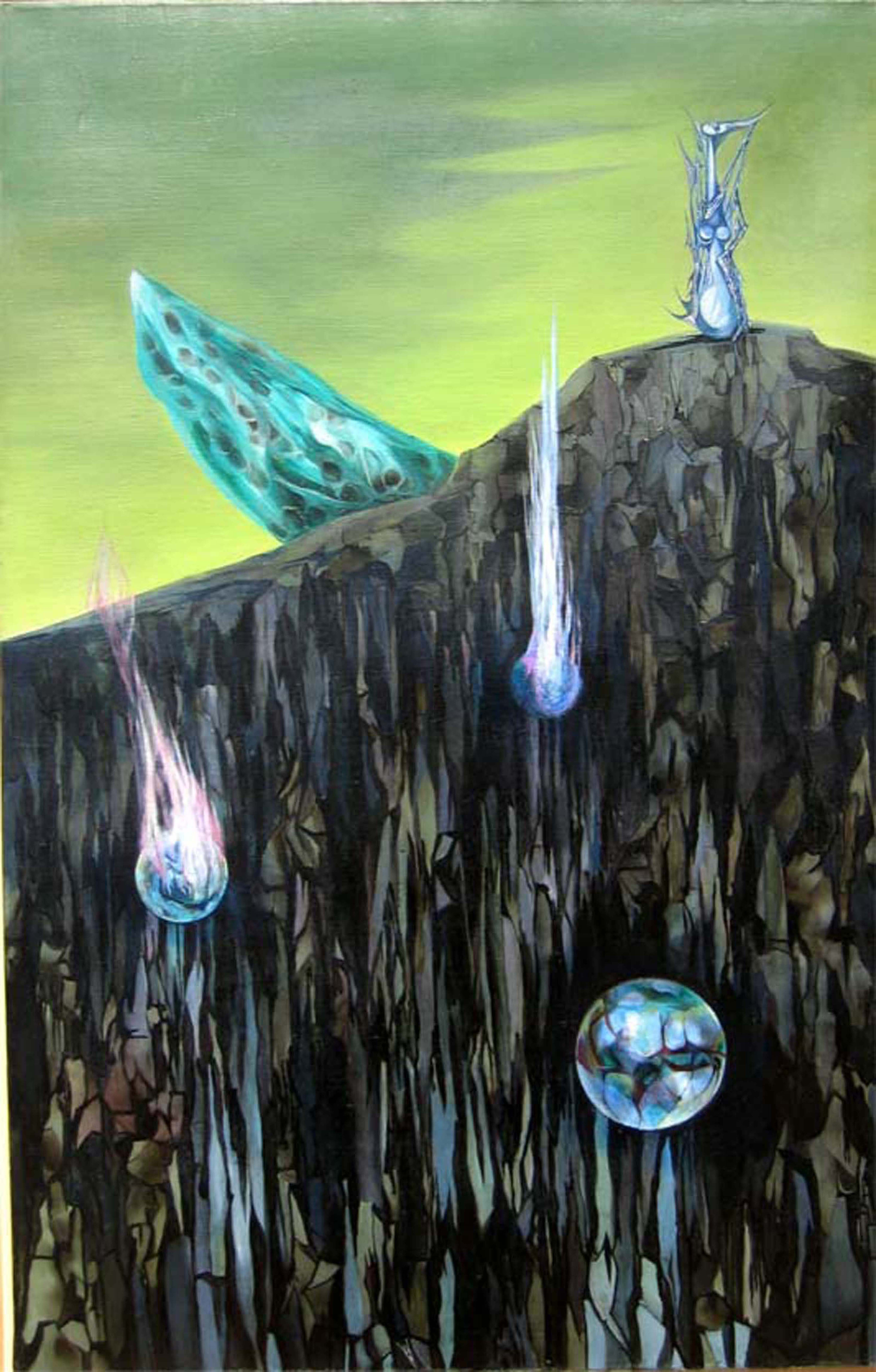 Verbotenes Landtitle QS:P1476,de:"Verbotenes Land" label QS:Lde,"Verbotenes Land" label QS:Lfr,"Pays interdit"